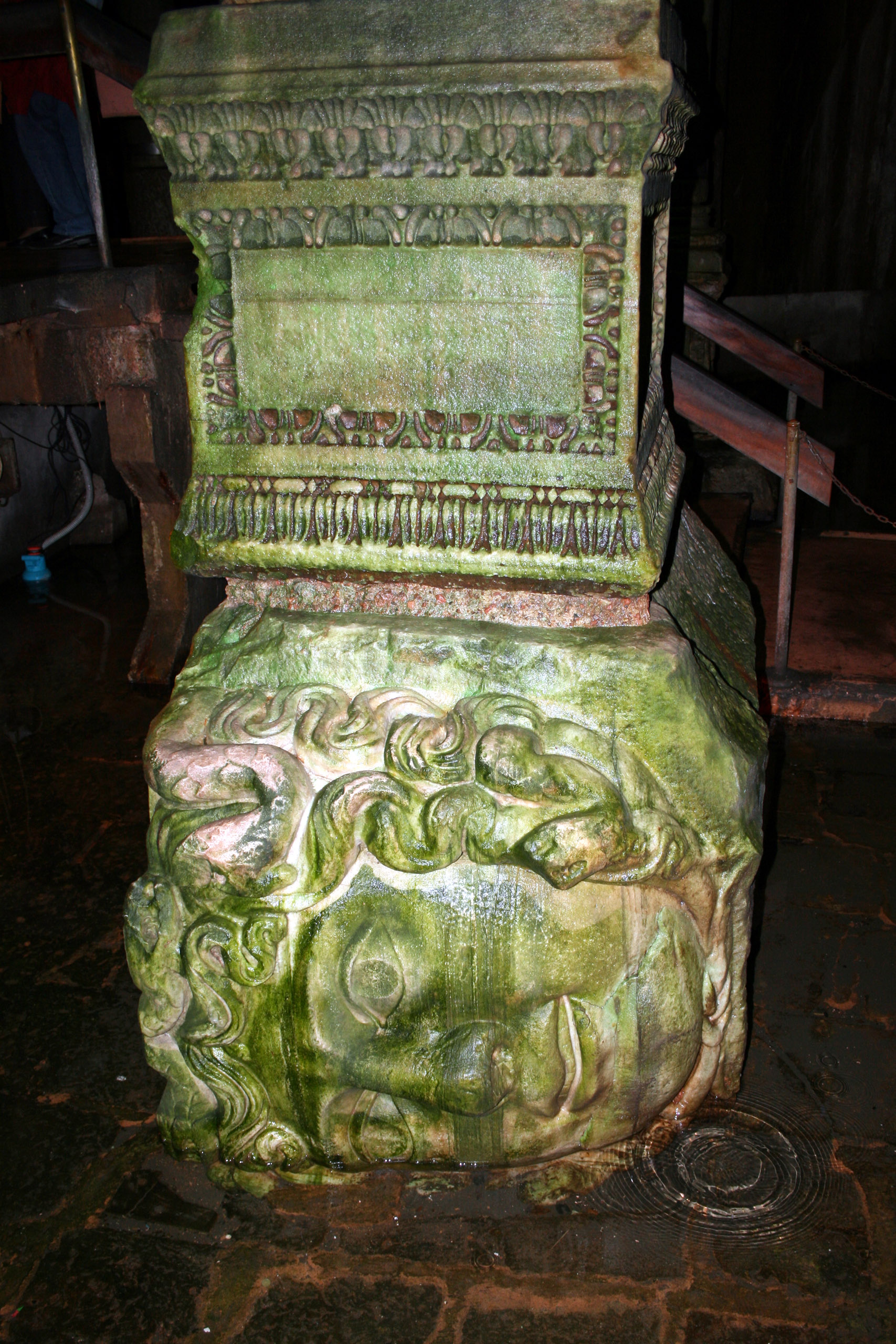 La Méduse dans la citerne à Istamboul